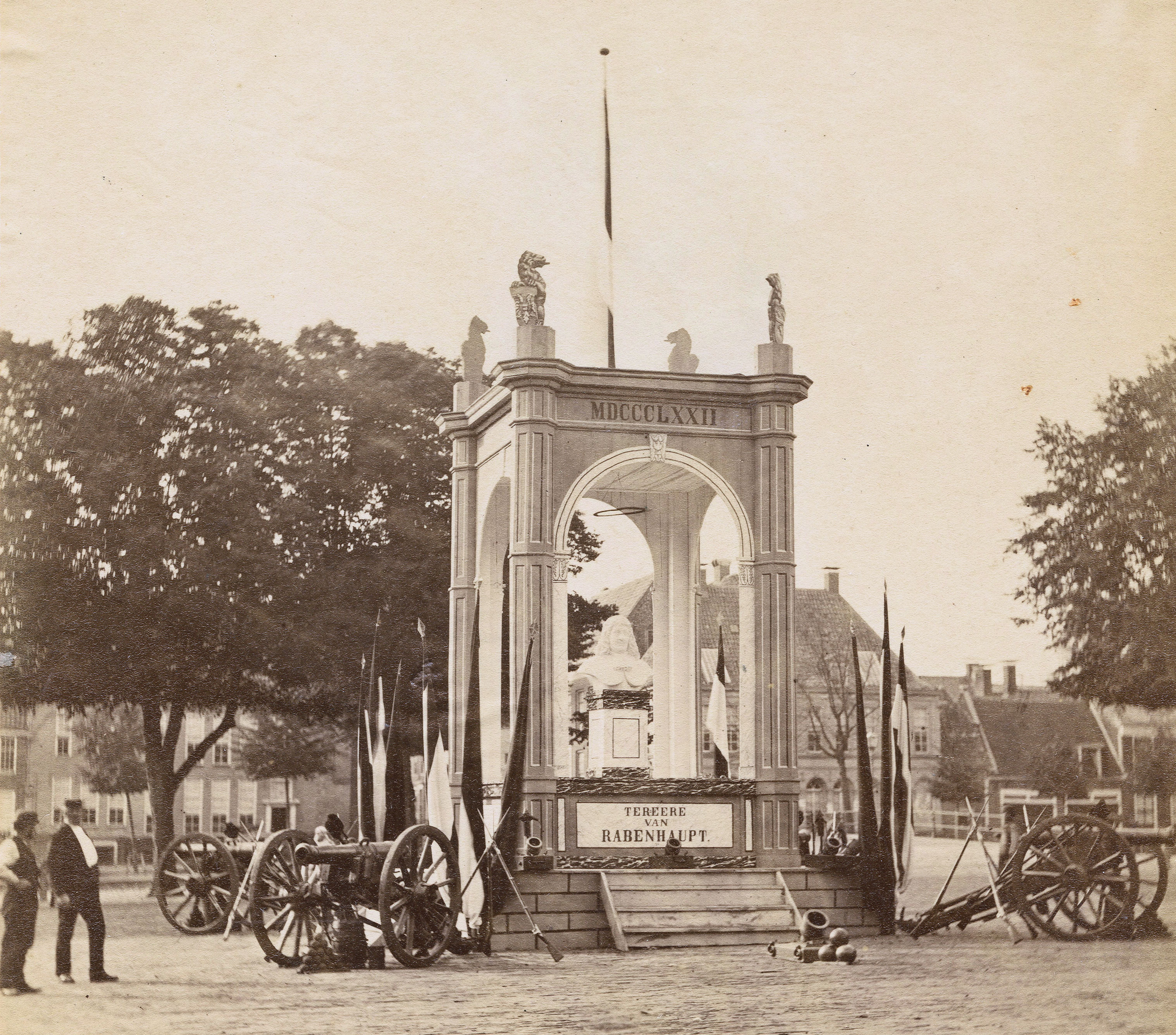 Rabenhaupt-monument ter herinnering aan 200 jaar Gronings Ontzet, in 1872 geplaatst op de Ossenmarkt in Groningen.